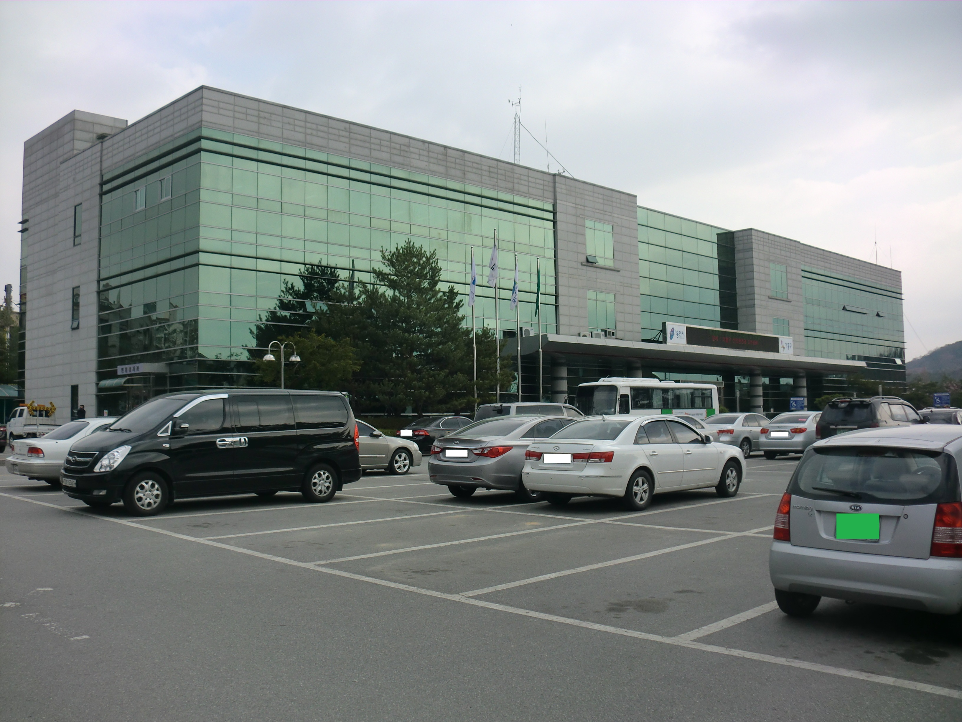 경기도 용인시에 있는 기흥구청